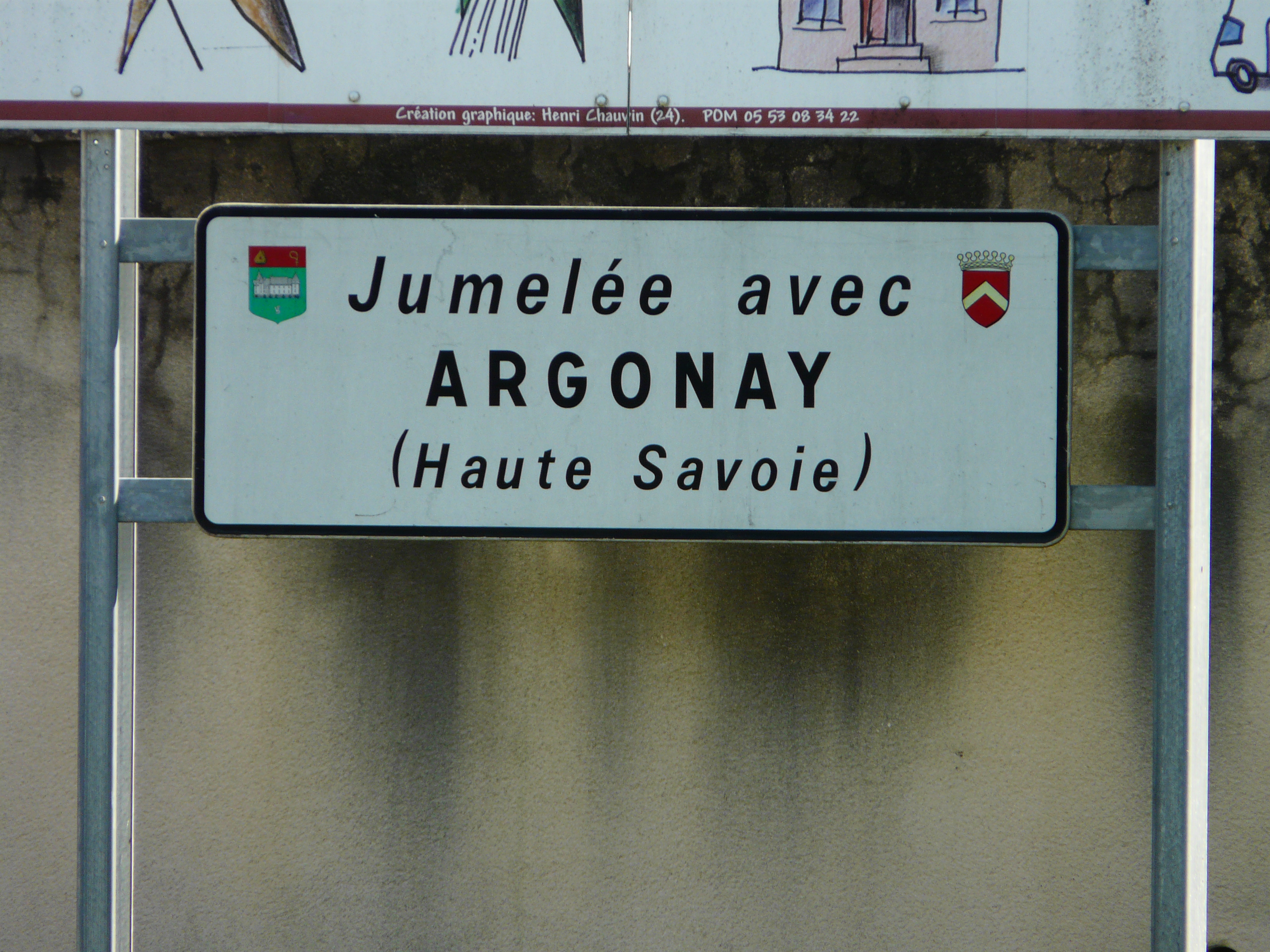 Panneau de jumelage à Château-l'Évêque, Dordogne, France.